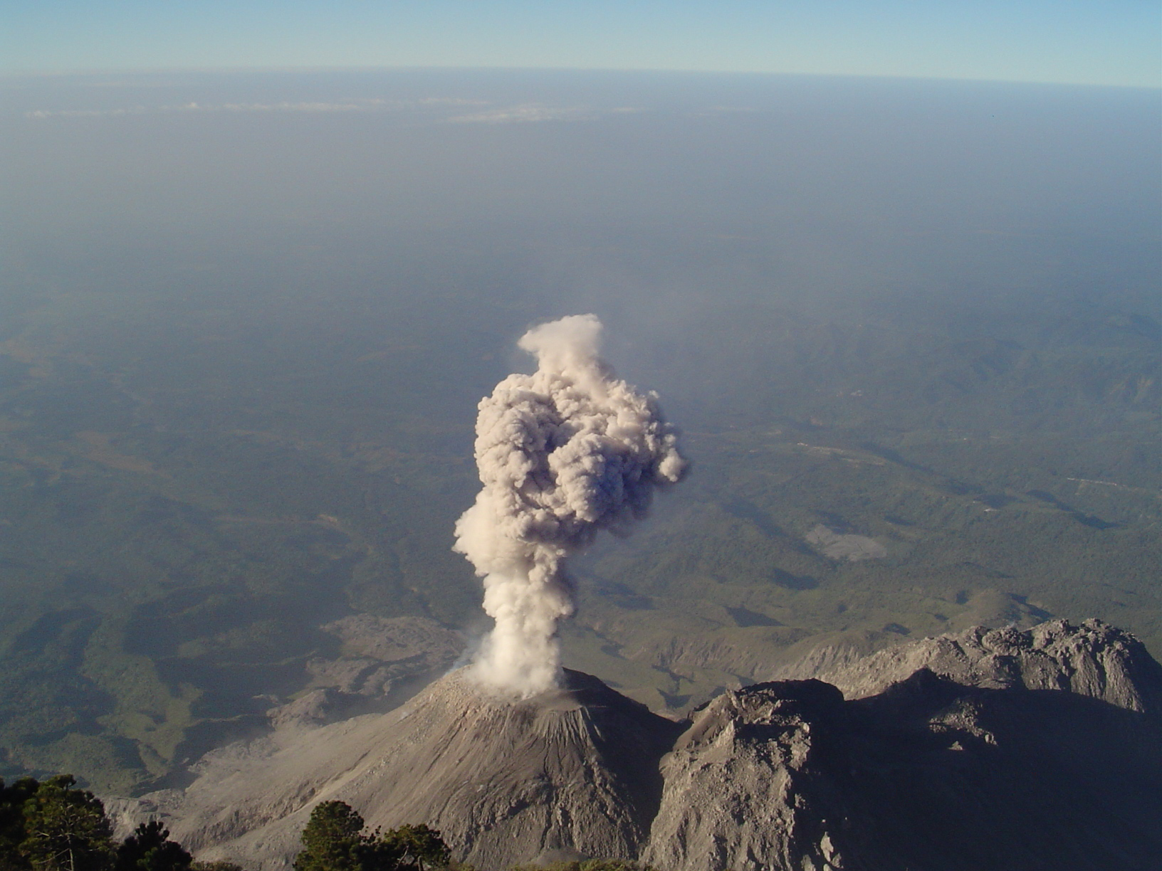 Volcan Santiaguito, Quetzaltenango, Guatemala (7 January 2007)